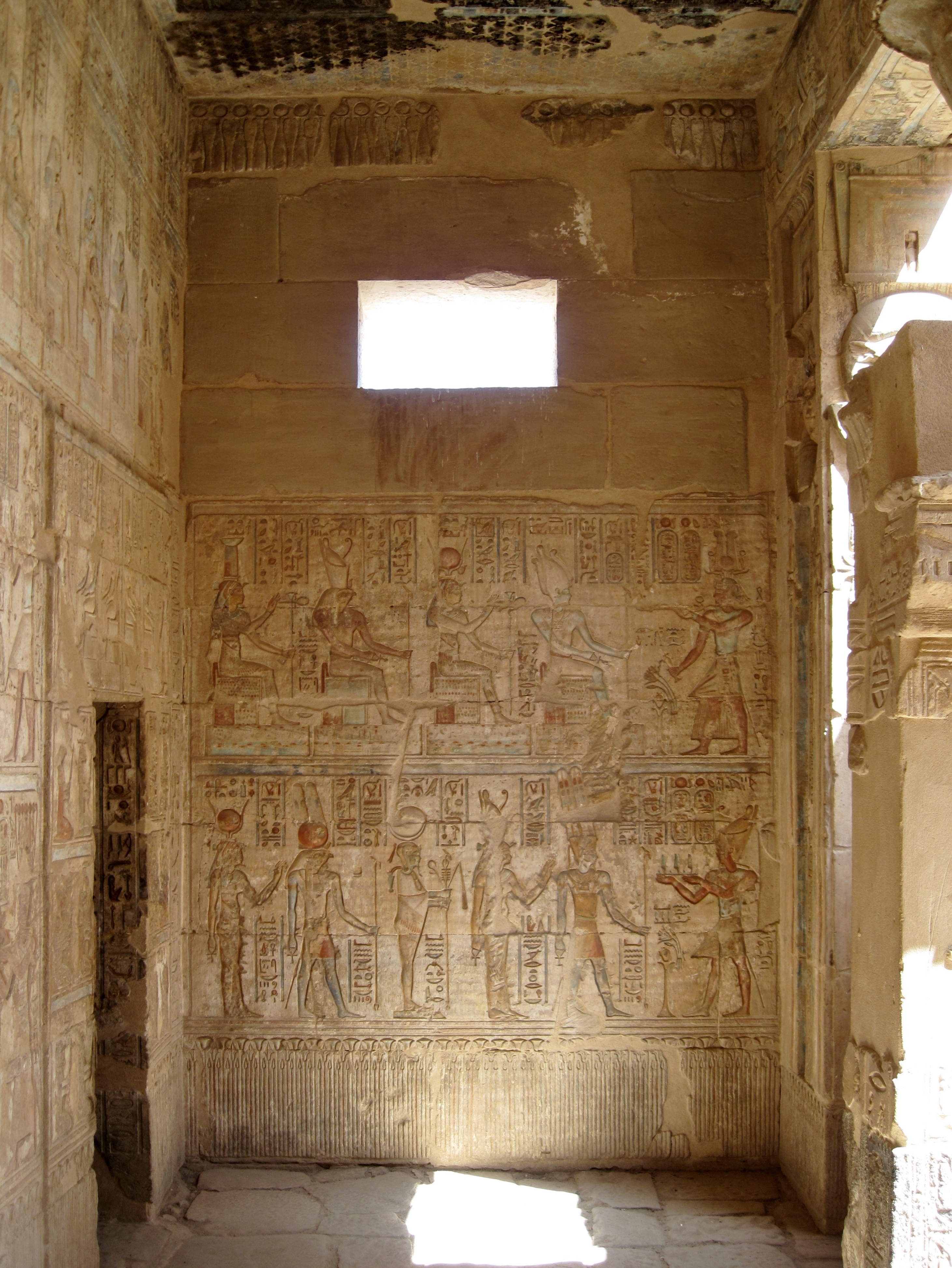 Innenraum im Hathor-Tempel von Deir el-Medina („Kloster der Stadt“), altägyptisch Set Maat („Platz der Wahrheit“), in Theben-West bei Luxor, Ägypten